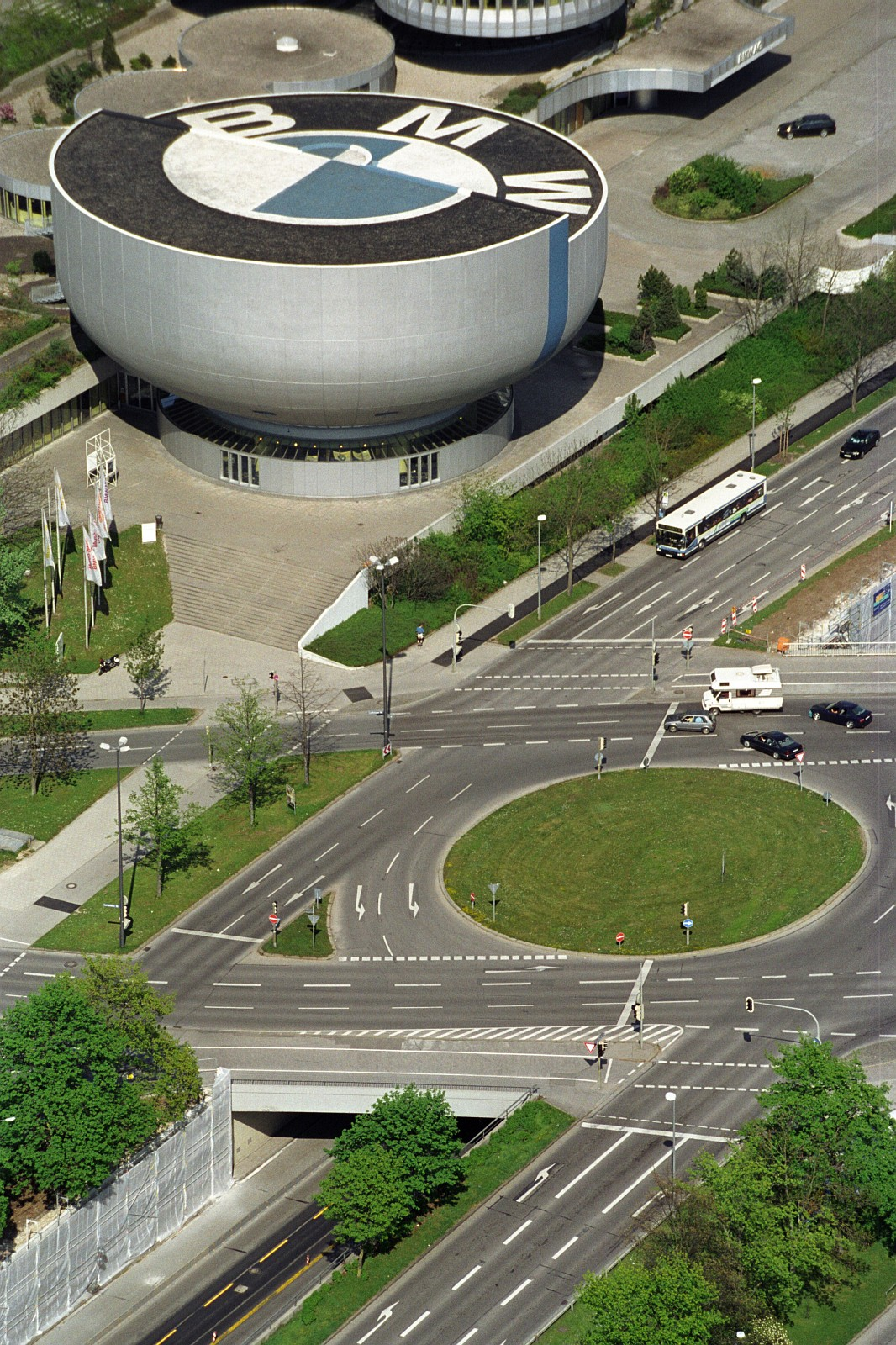 BMW Museum